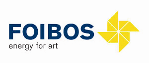 Toto je logo společnosti FOIBOS.